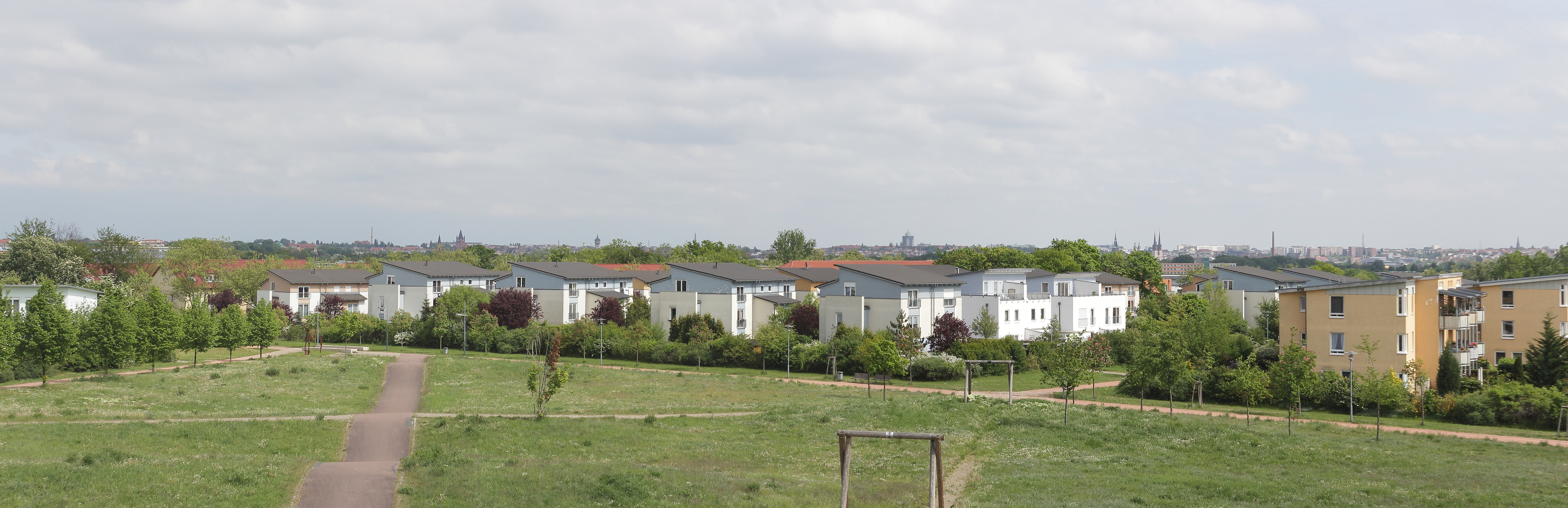 Heide-Süd, Grünes Dreieck